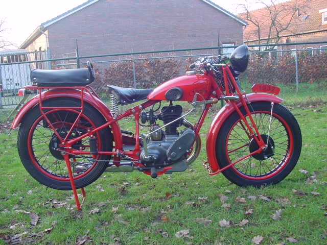 Toestemming van Yesterdays Antique Motorcycles (